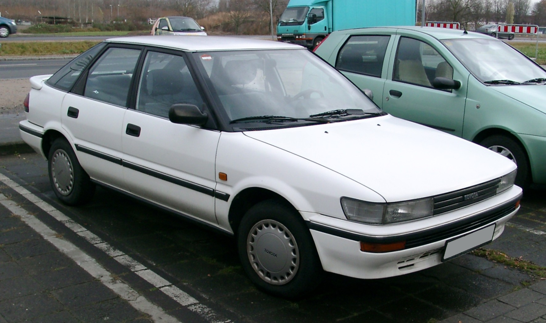 Toyota Corolla E90